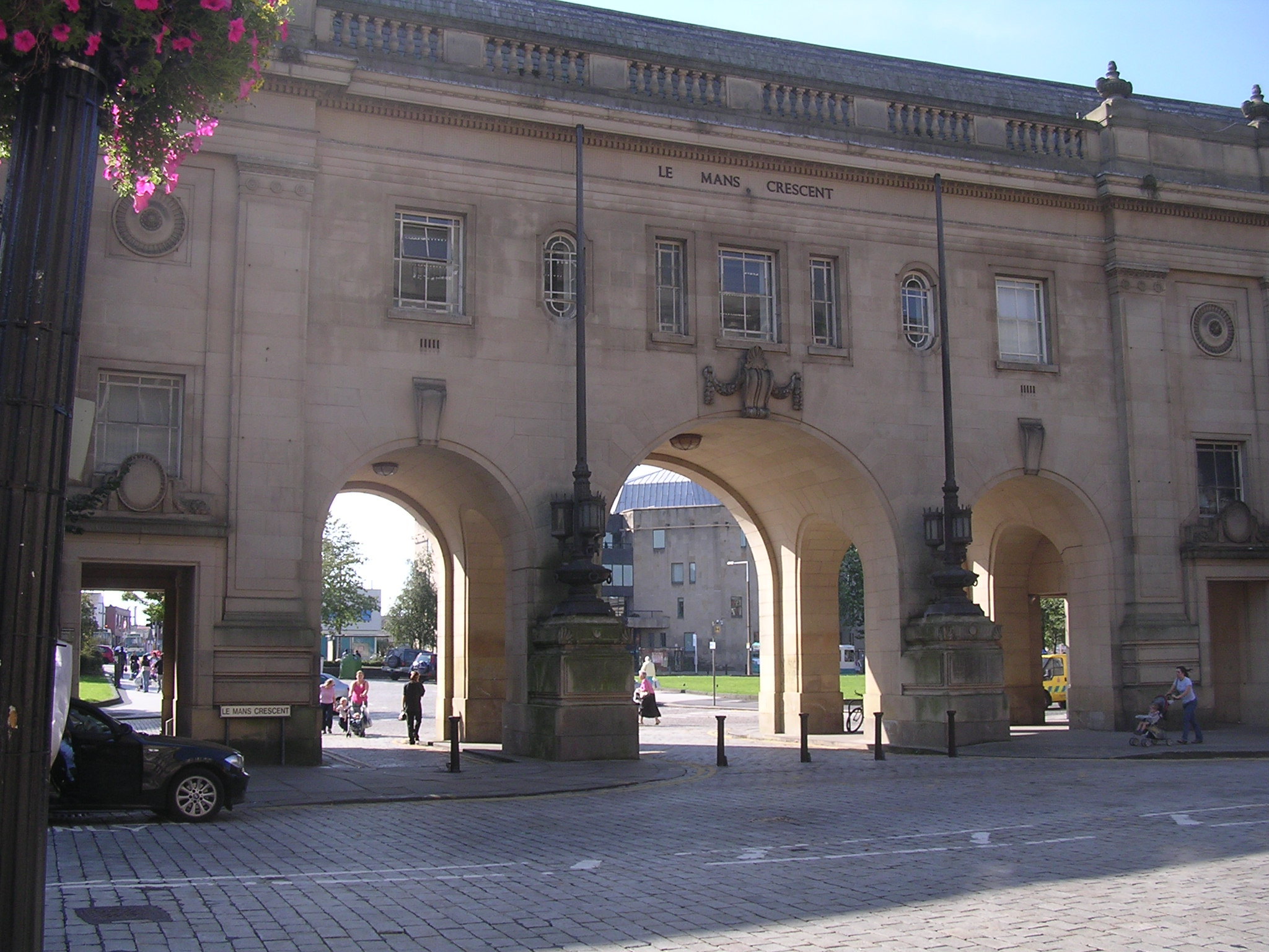 Le "Le Mans crescent", musée de Bolton dont le nom provient de la ville automobile française.